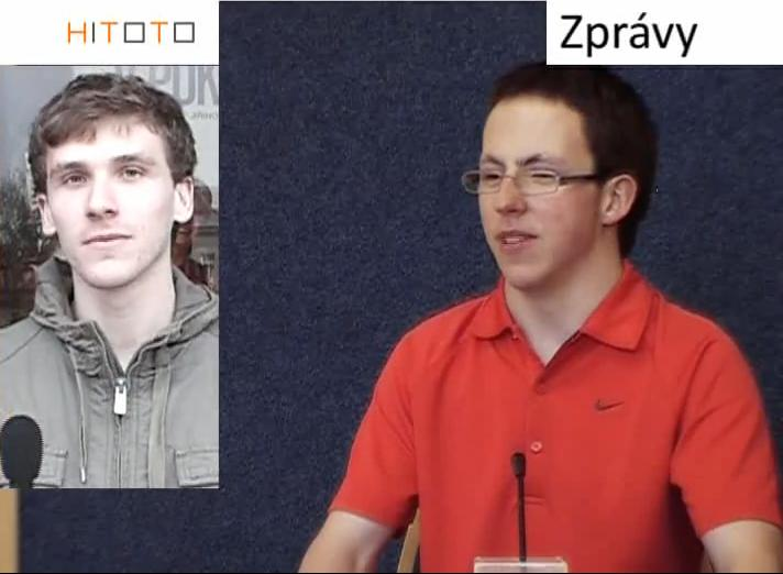 Snímek z vysílání studentská televize Hitoto, působící na Gymnáziu Třebíč